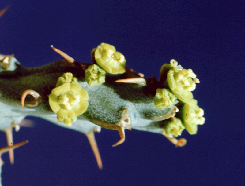 Euphorbia graciliramea (Blüte)